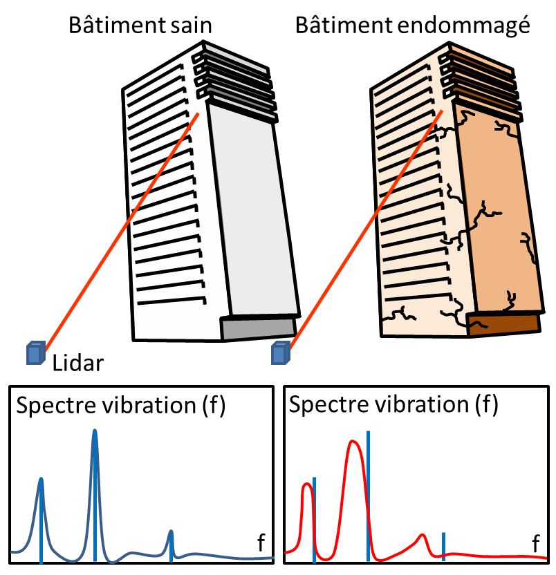 Principe du diagnostic structurel à distance de bâtiments potentiellement endommagés par lidar. Les modes de vibration d'un immeuble sont de fréquence plus faible et plus amortis après un endommagement.